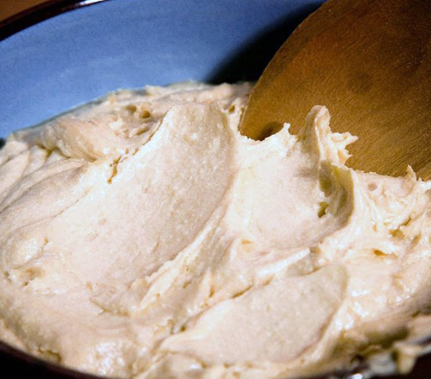 Queso de Bota o de Vexiga